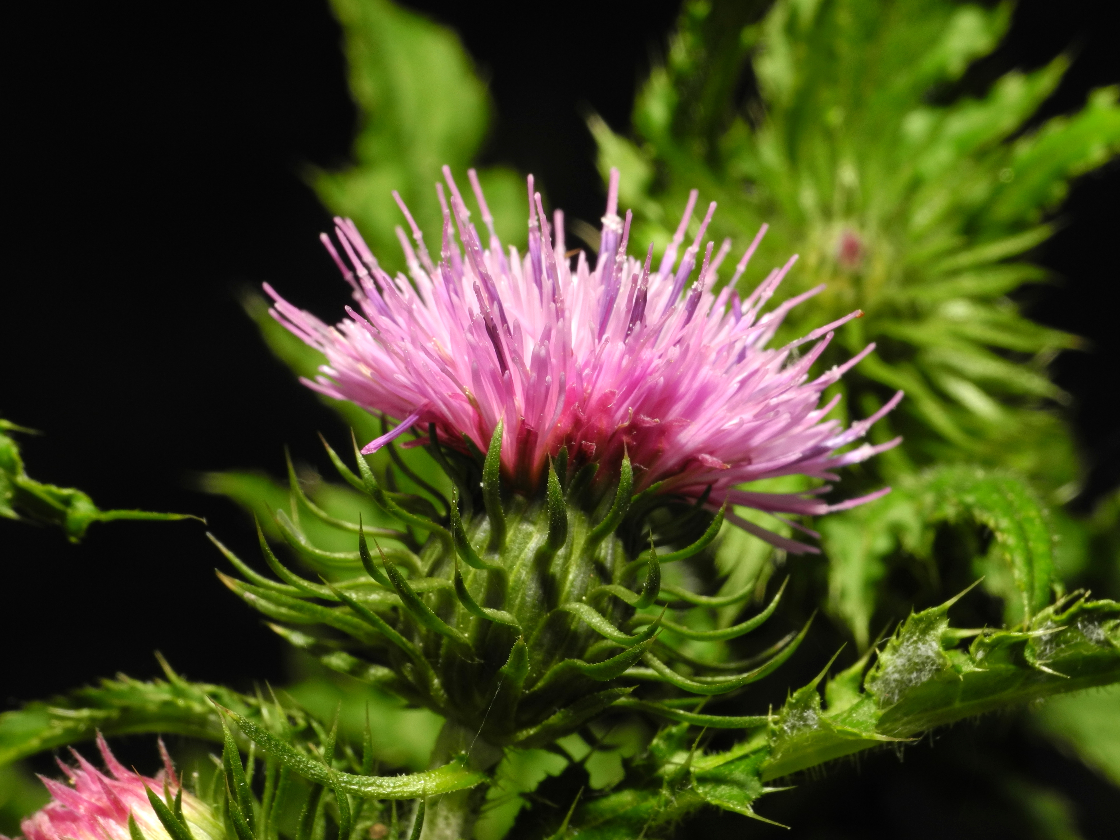 Fleur de chardon (Carduus platypus). Image prise avec la bonnette Raynox DCR-250.